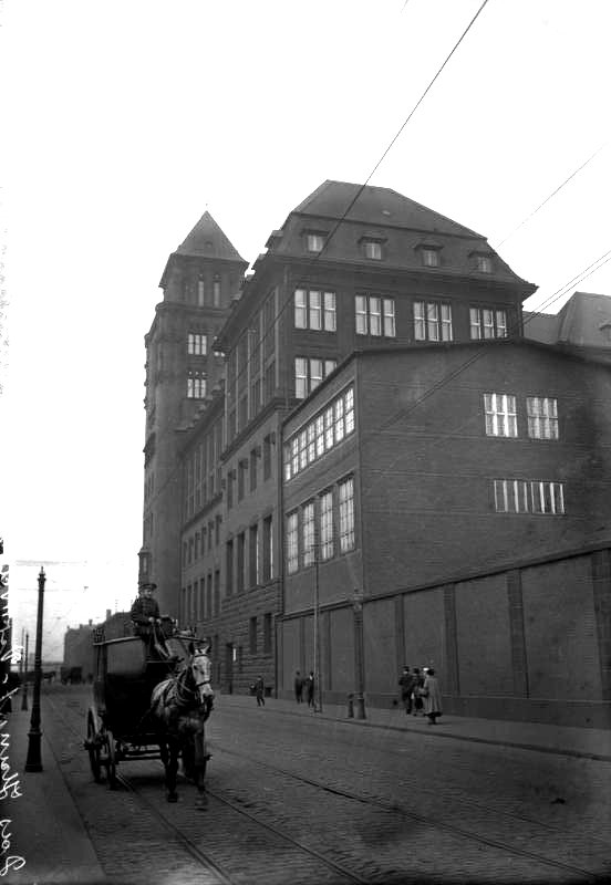 Title: Essen, Krupp Hauptverwaltung Extra information: Essen.- Hauptverwaltung der Krupp AG, Pferdekutsche auf der Straße Factual corrections and alternative descriptions are encouraged separately from the original description. Additionally errors can be reported at this page to inform the Bundesarchiv. Original historic description: Das Hauptverwaltungsgebäude von Krupp in Essen